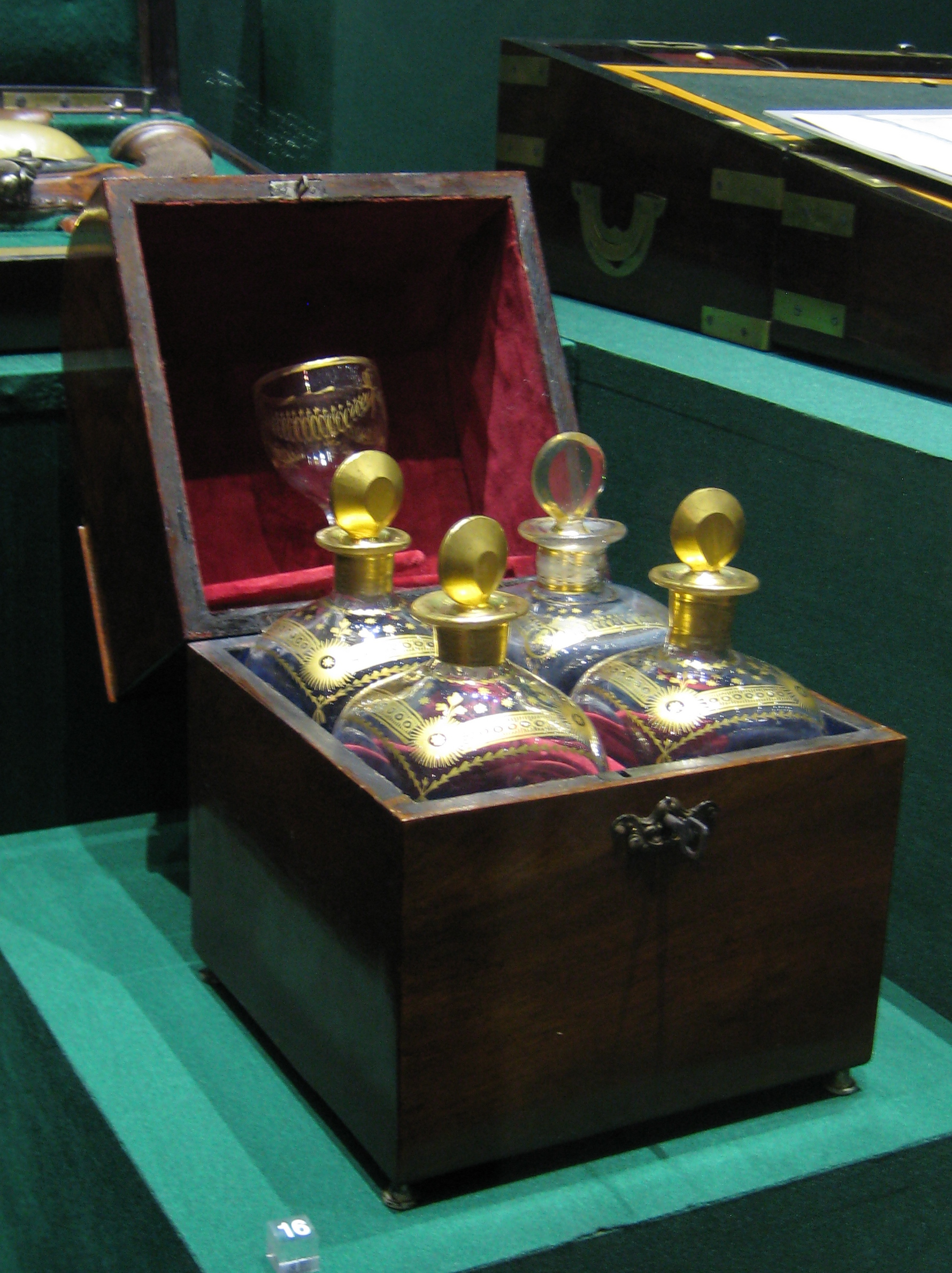 Музей "Бородинская панорама"